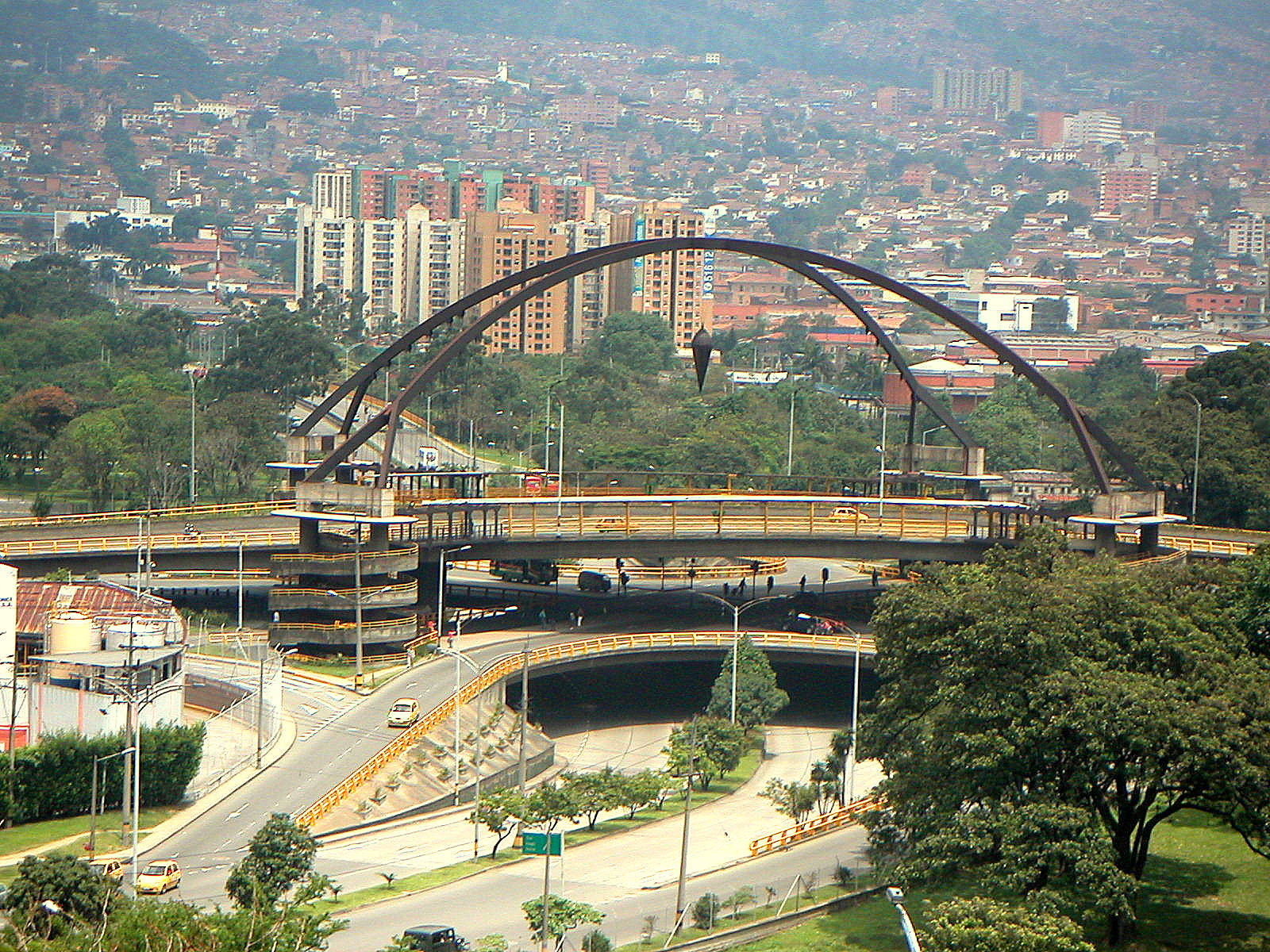 Intercambio vial que marca el punto cero de Medellín, es una una gigantesca plomada suspendida, de seis metros de alto y dos de ancho, que pesa 800 kilos.